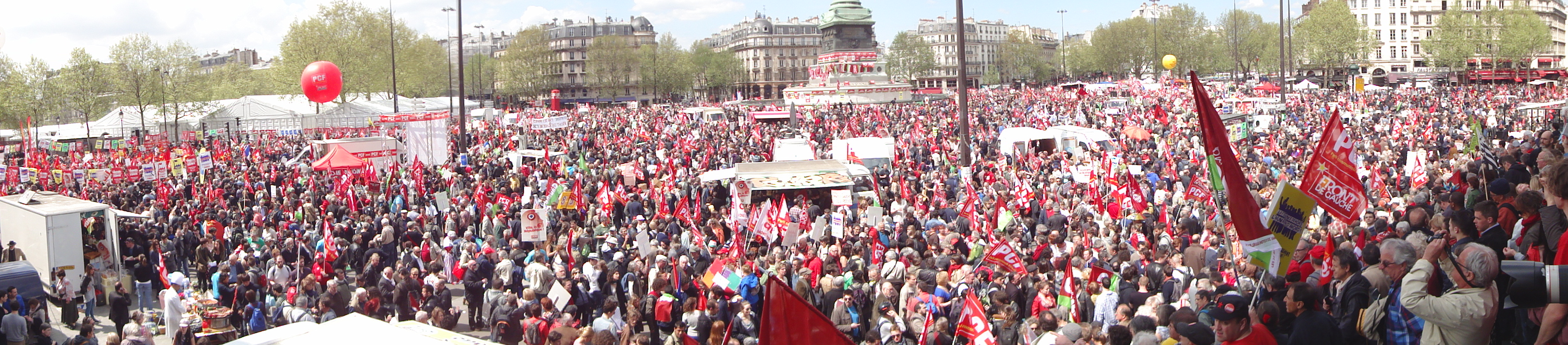 "Marche citoyenne pour la VIe République", place de la Bastille, le 5 mai 2013, à l'appel du Parti de gauche